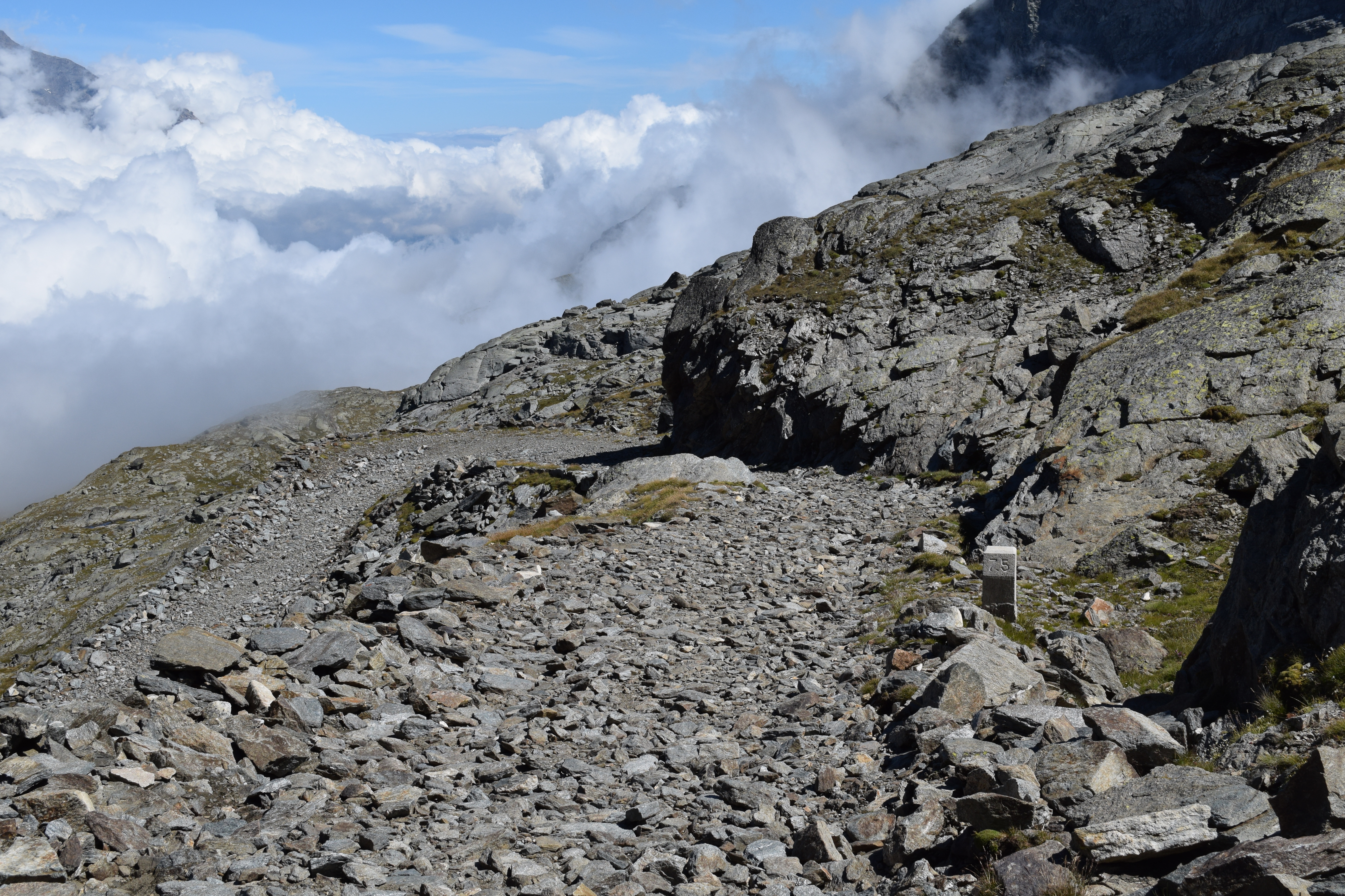 Strada militare Bivio Varisello - Giaset - Malamot; stato al km. 7,5